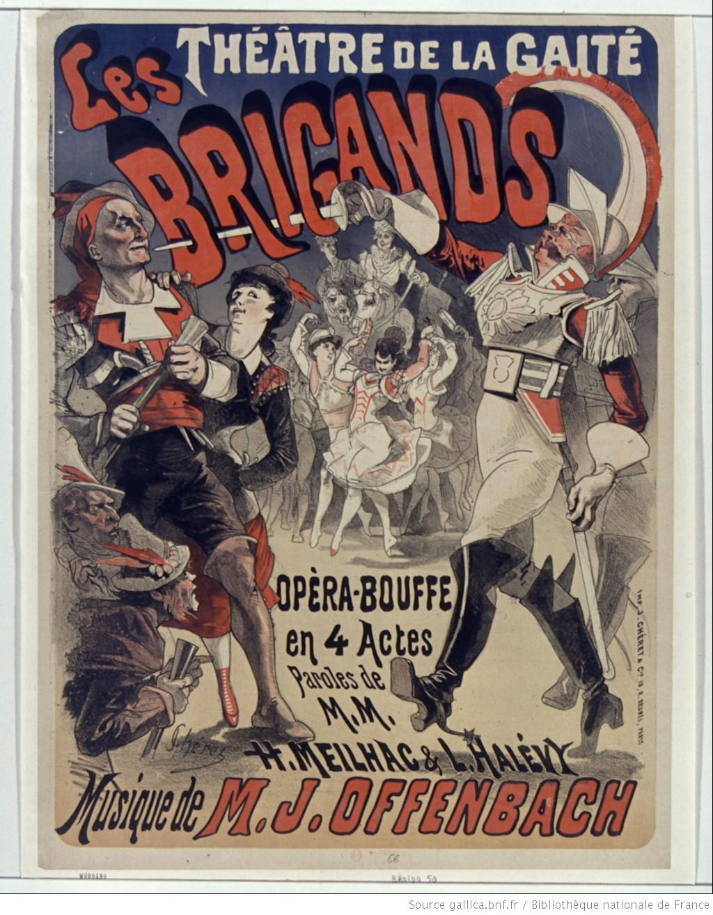 Affiche de Jules Chéret pour la création de la 2e version des Brigands au théâtre de la Gaîté en 1878.